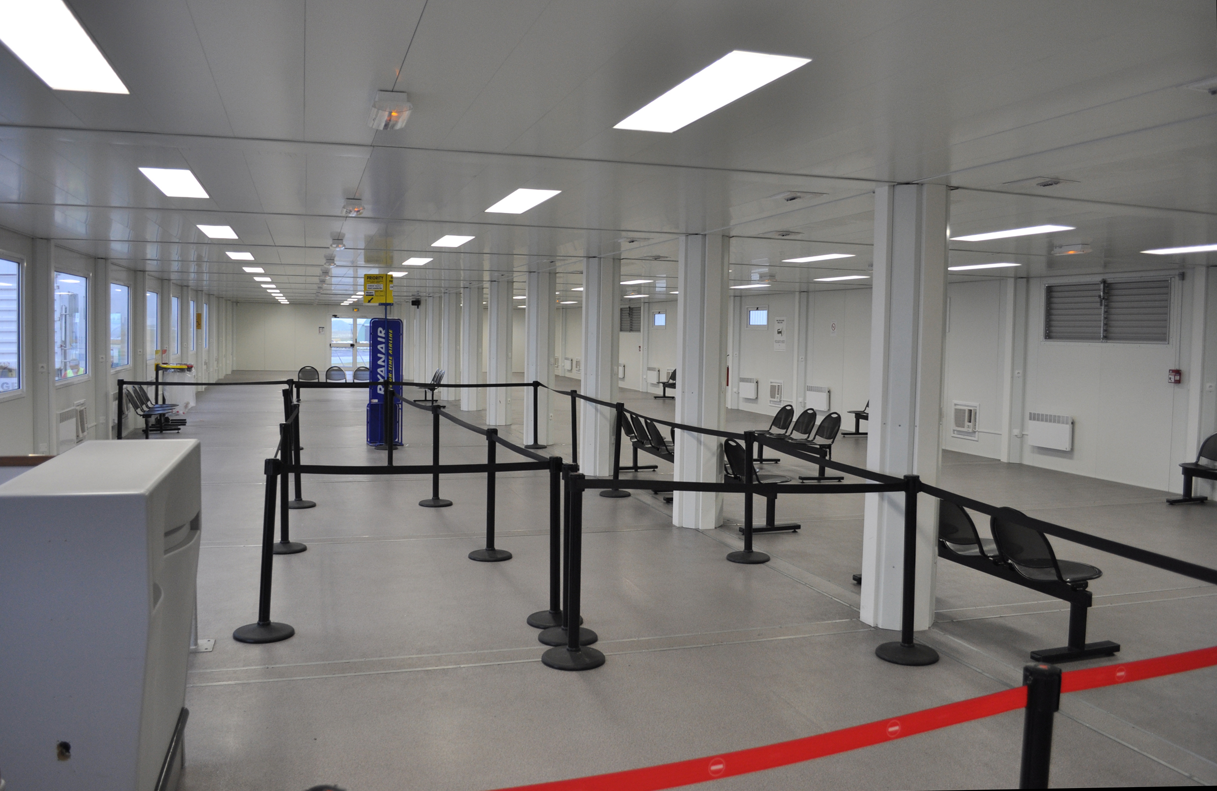 BOARDING LOUNGE AT PARIS-BEAUVAIS AIRPORT